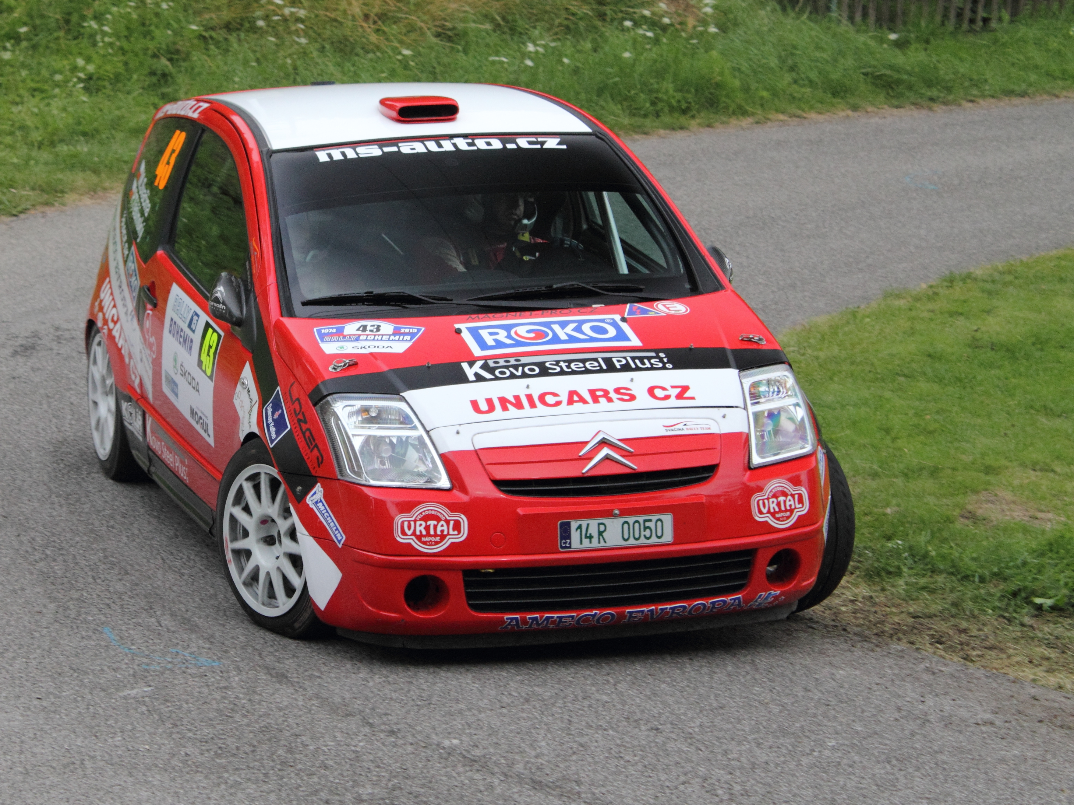 Rally Bohemia 2015 - Svačina, Citroën C2 R2 Max